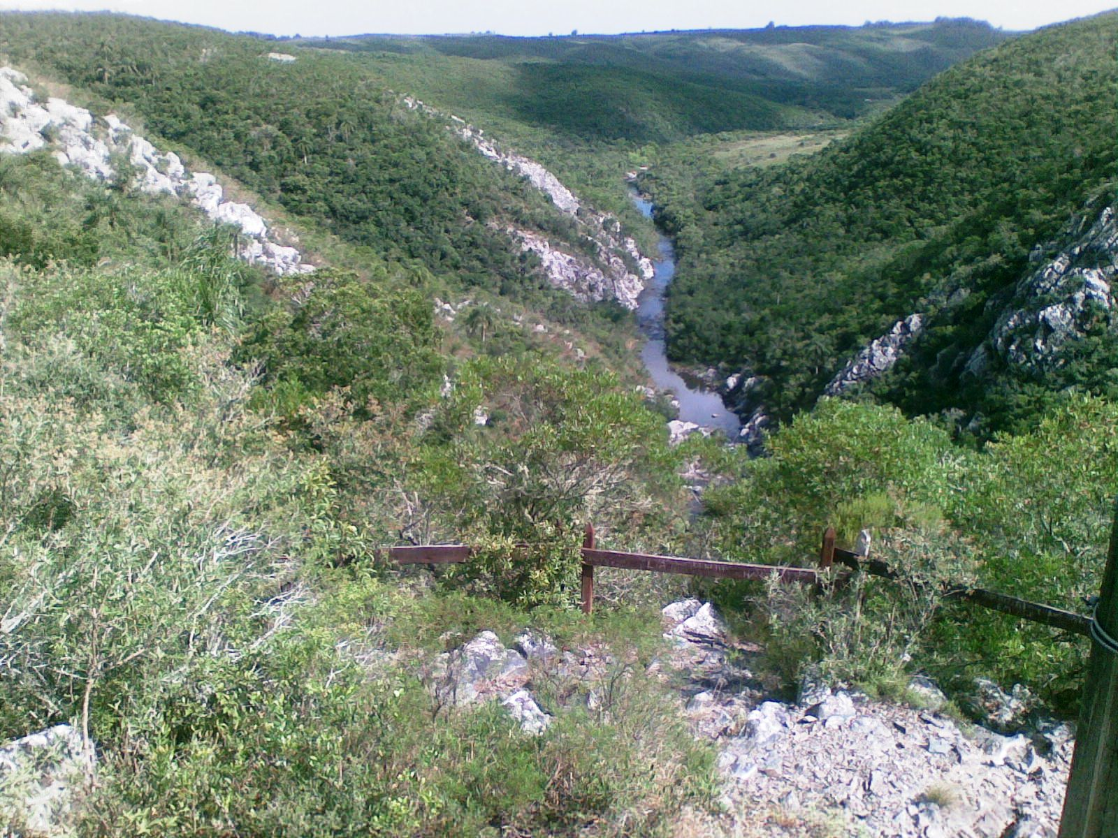 Desde el mirador